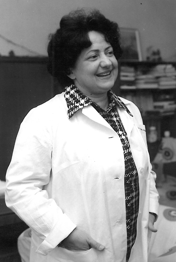 dr. Mioara Mincu